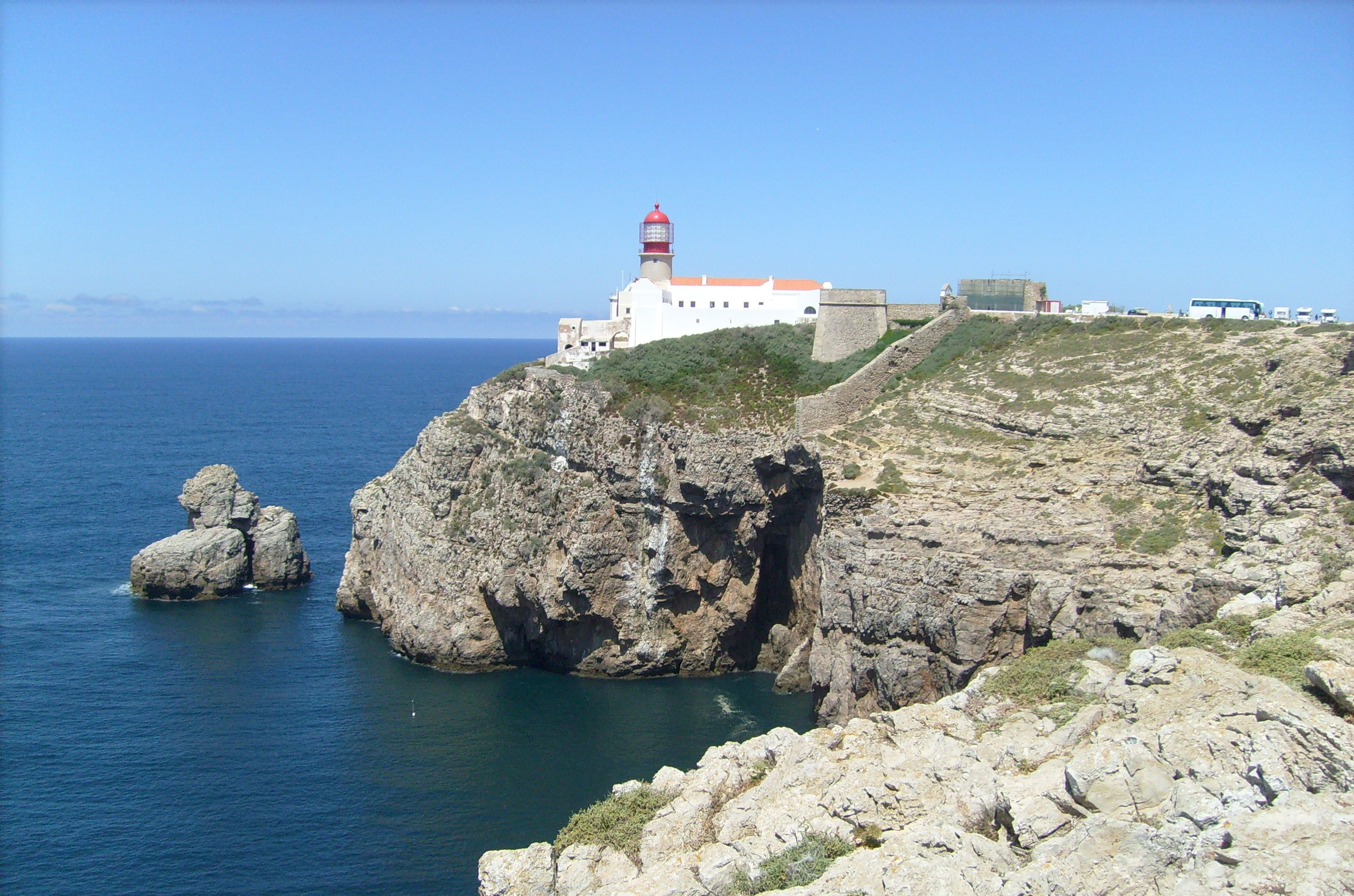 Der Leuchtturm des Cabo de São Vicente, des südwestlichsten Punkt Europas. Der Leuchtturm leuchtet 90 Kilimeter weit, man sieht auch die schroffen Felsen